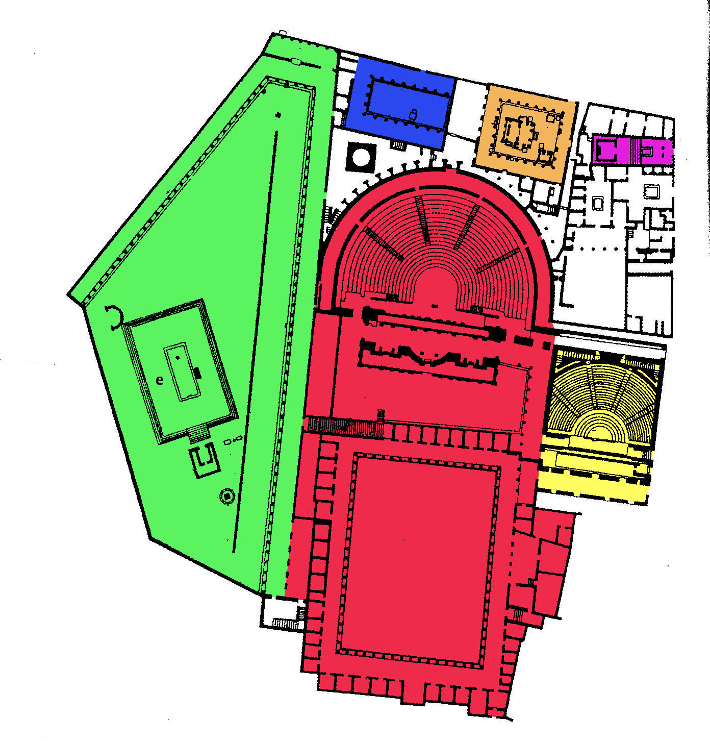 Theaterviertel in Pompeji